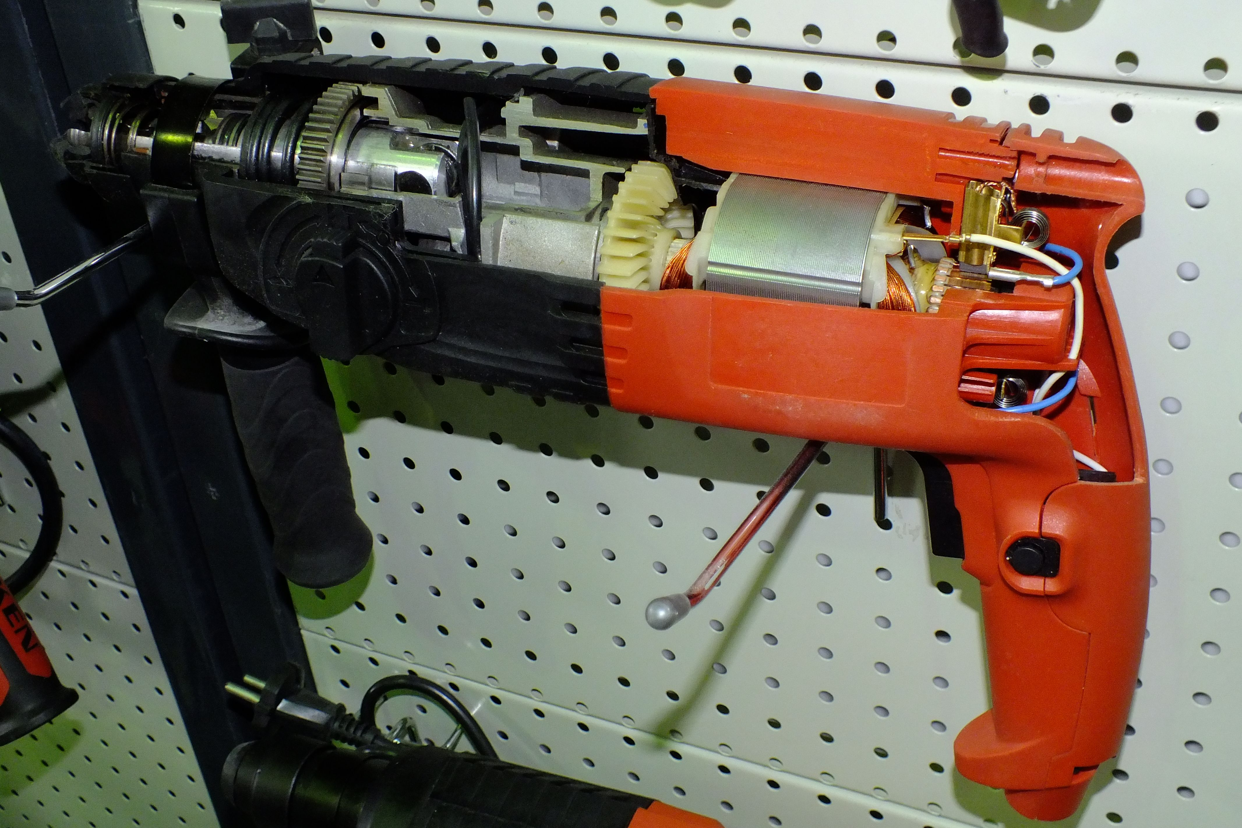 Перфоратор на выставке, в разрезе